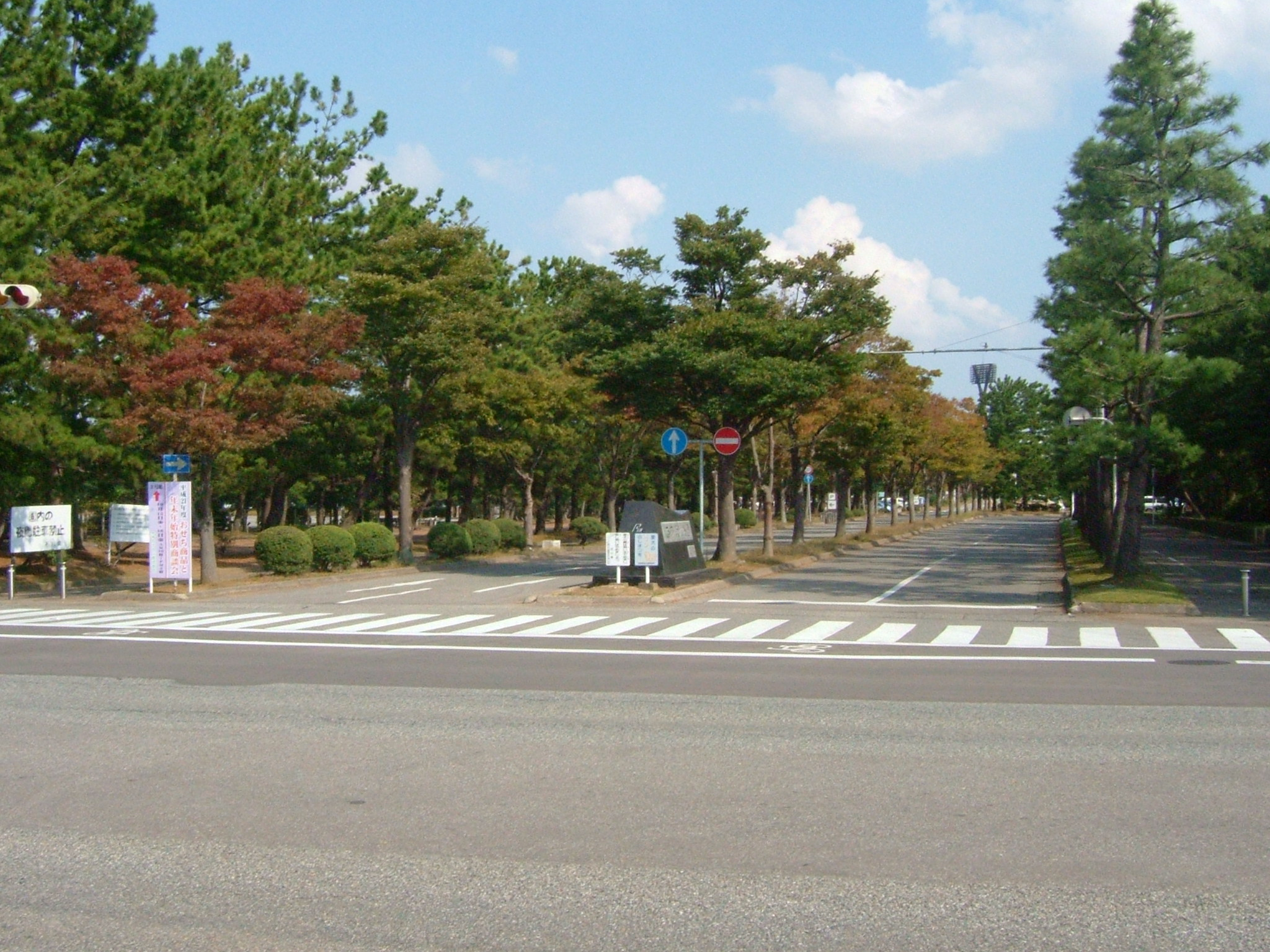 石川県金沢市にある西部緑地公園（正門）